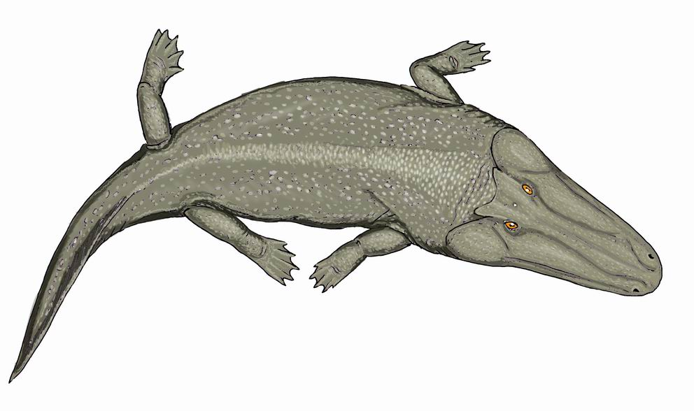 Cherninia denwai, my own work, Черниния - Cherninia denwai, гигантский мастодонзавр из среднего триаса Индии.